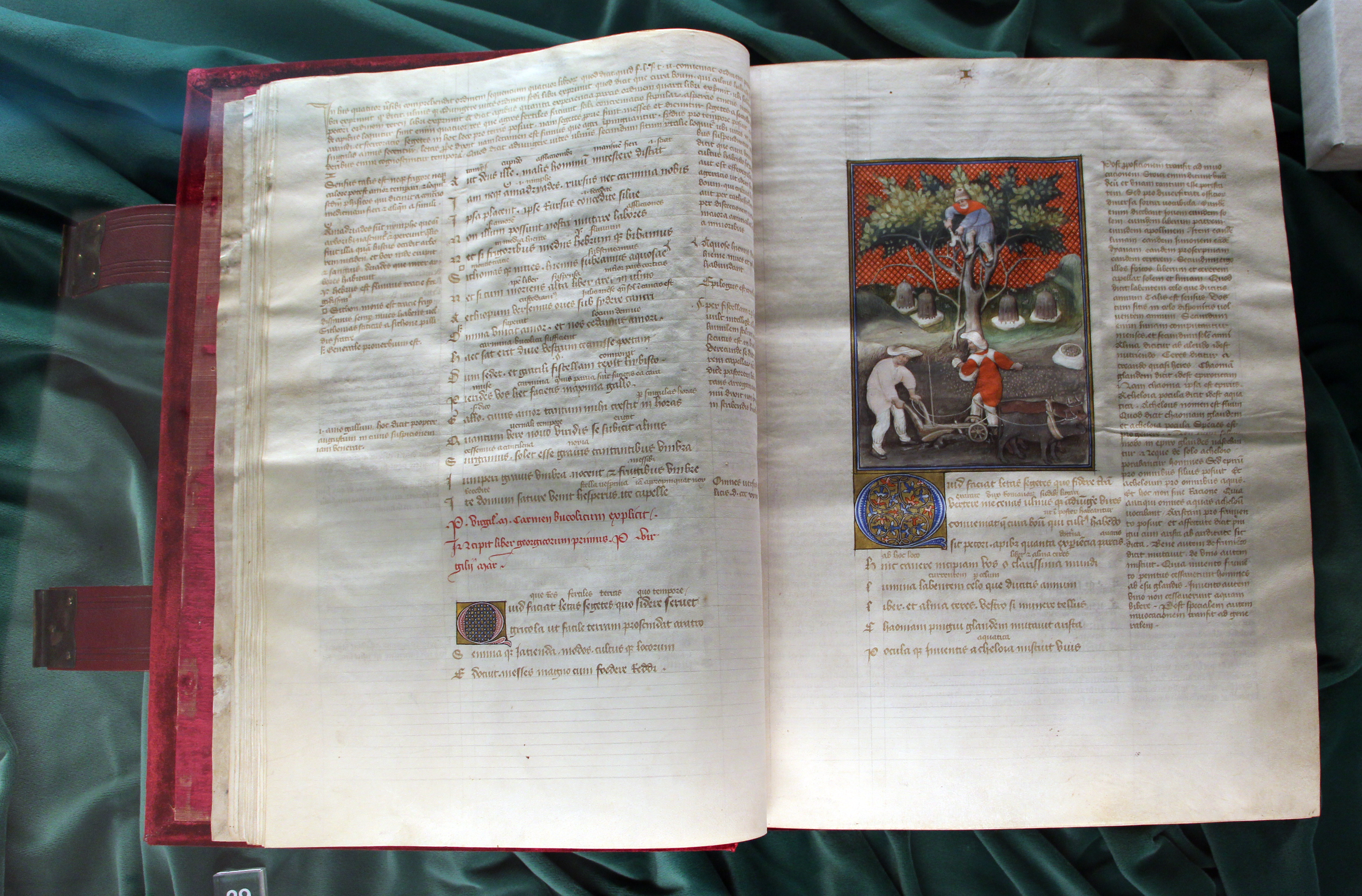 Biblioteca Medicea Laurenziana